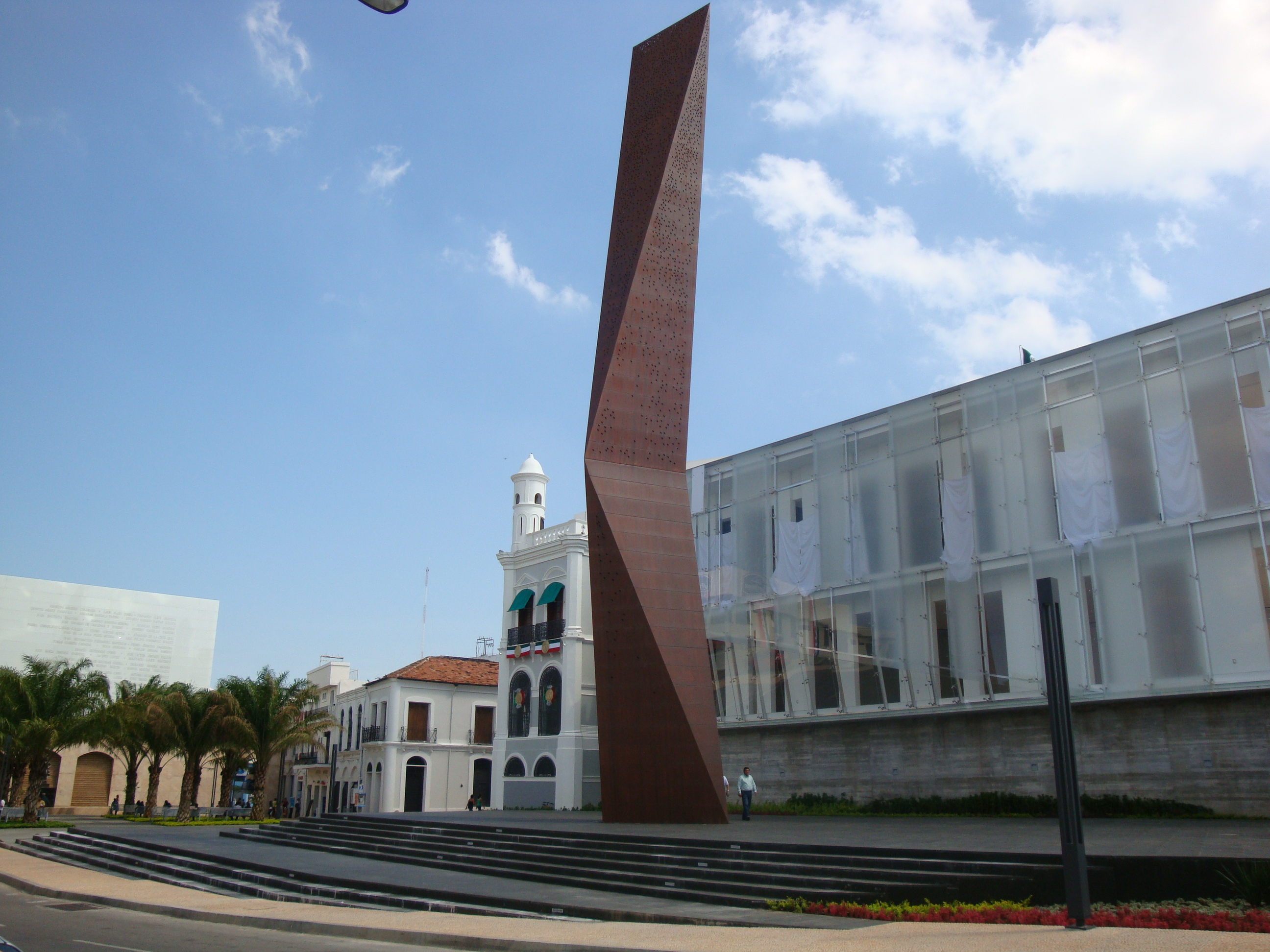 Plaza Bicentenario con su obelísco metálico de 30 m de altura, en la ciudad de Villahermosa, Tabasco, México.